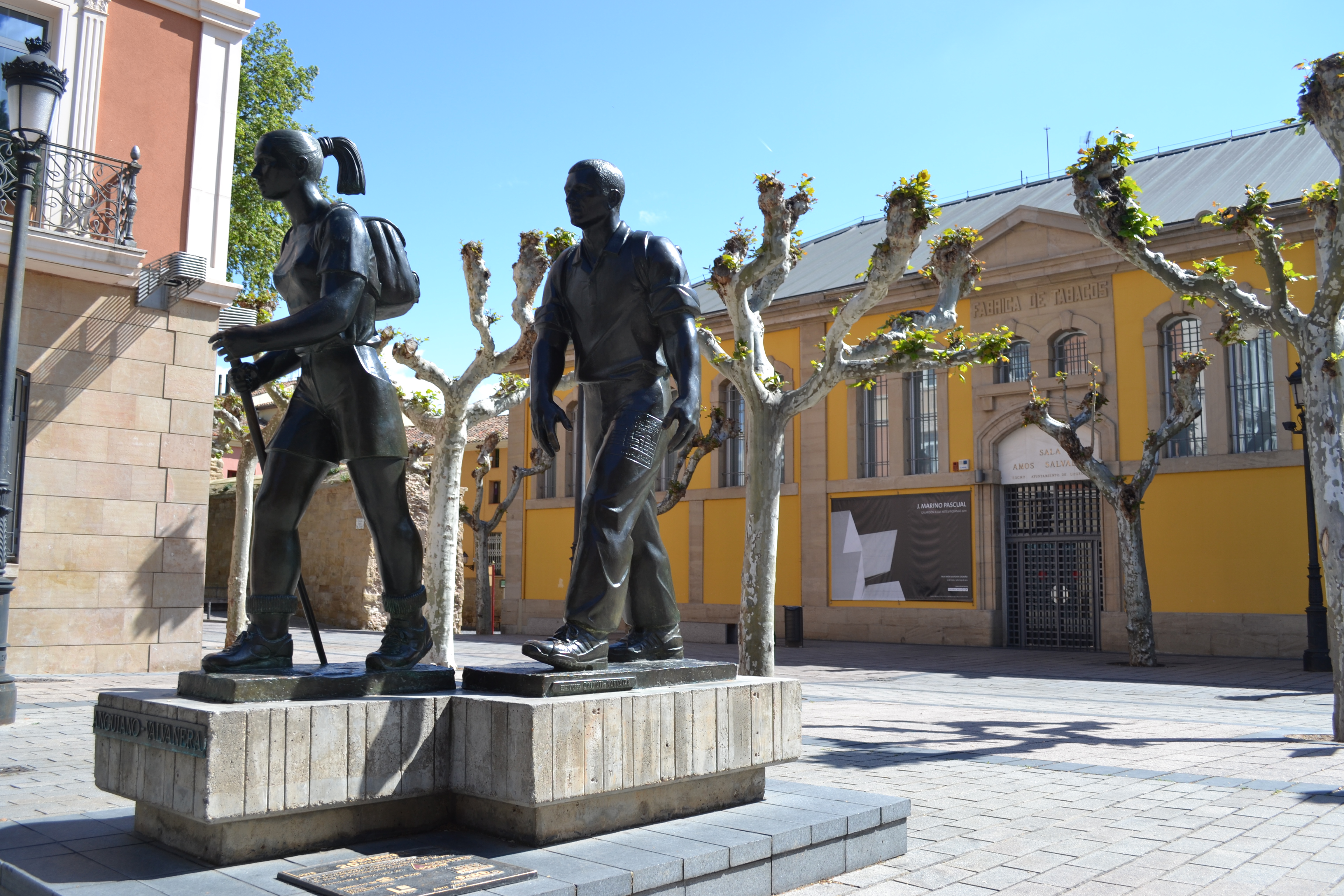 Estatua homenaje a los caminantes de la Valvanerada, Logroño